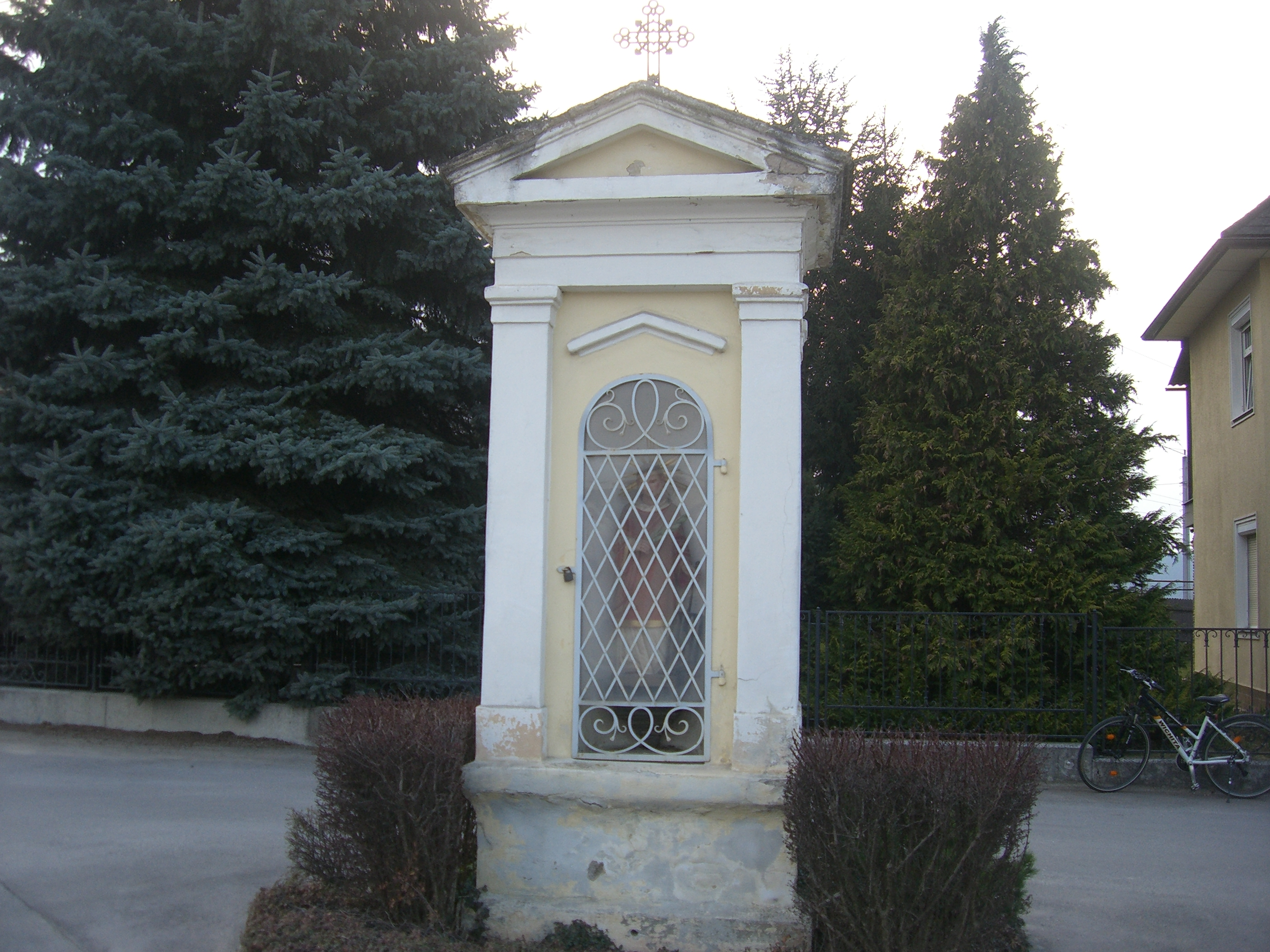 Bildstock in der Ledochowskastraße nahe Bahnübergang, Loosdorf.